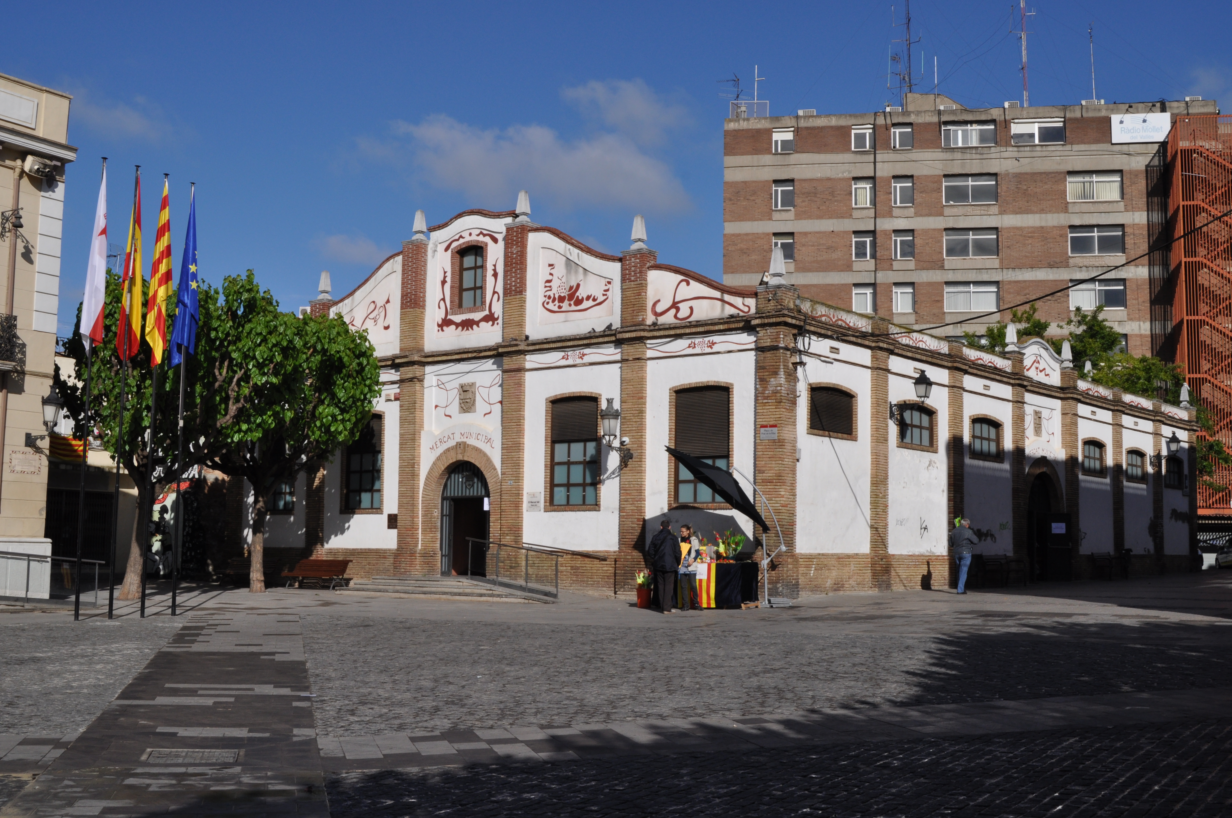 Diada de Sant Jordi de 2011 a Mollet del Vallès: Mercat Vell.